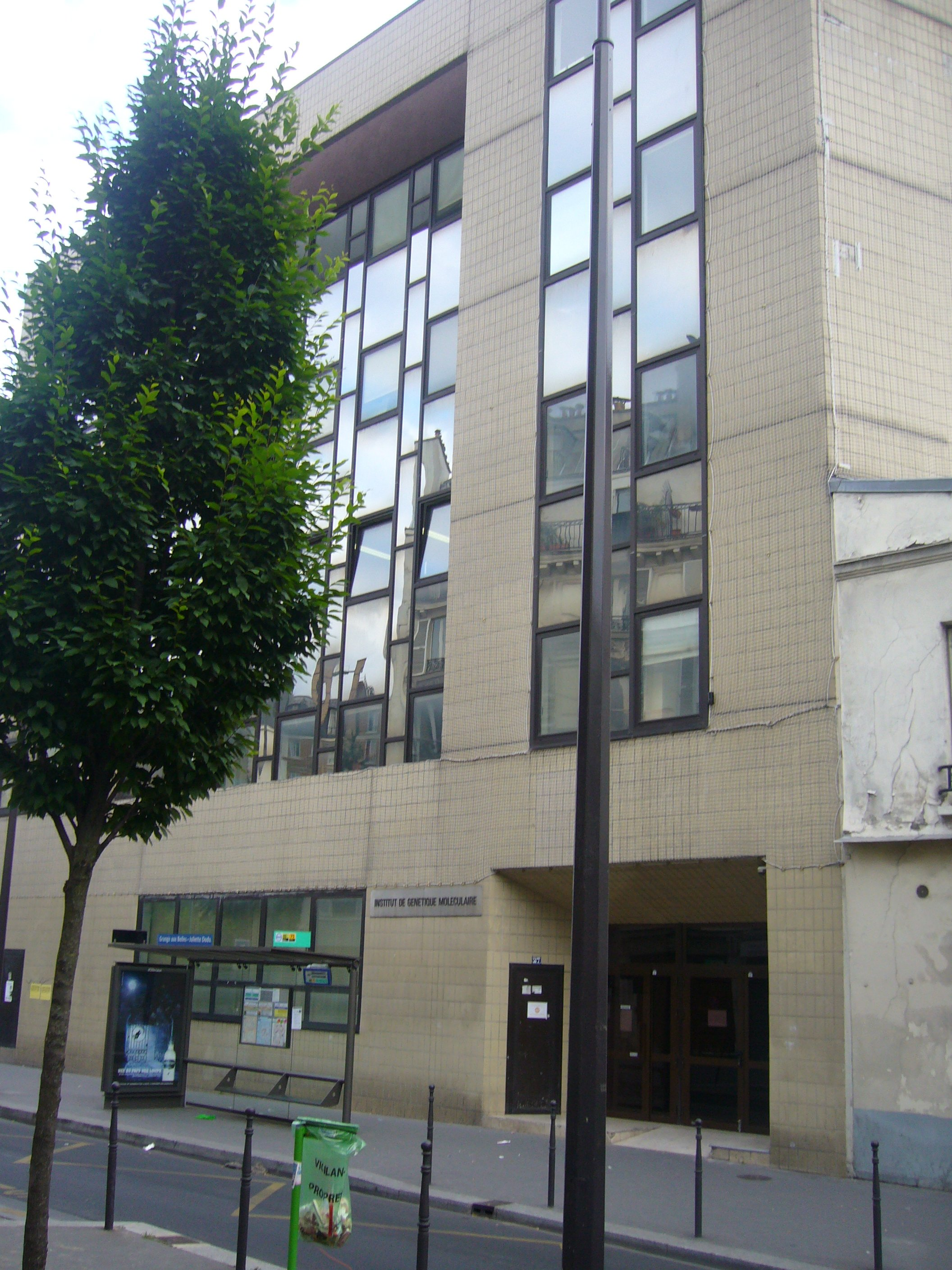 Centre Etude du Polymorphism Humain, 27 rue Juliette Dodu, 75010 Paris, France